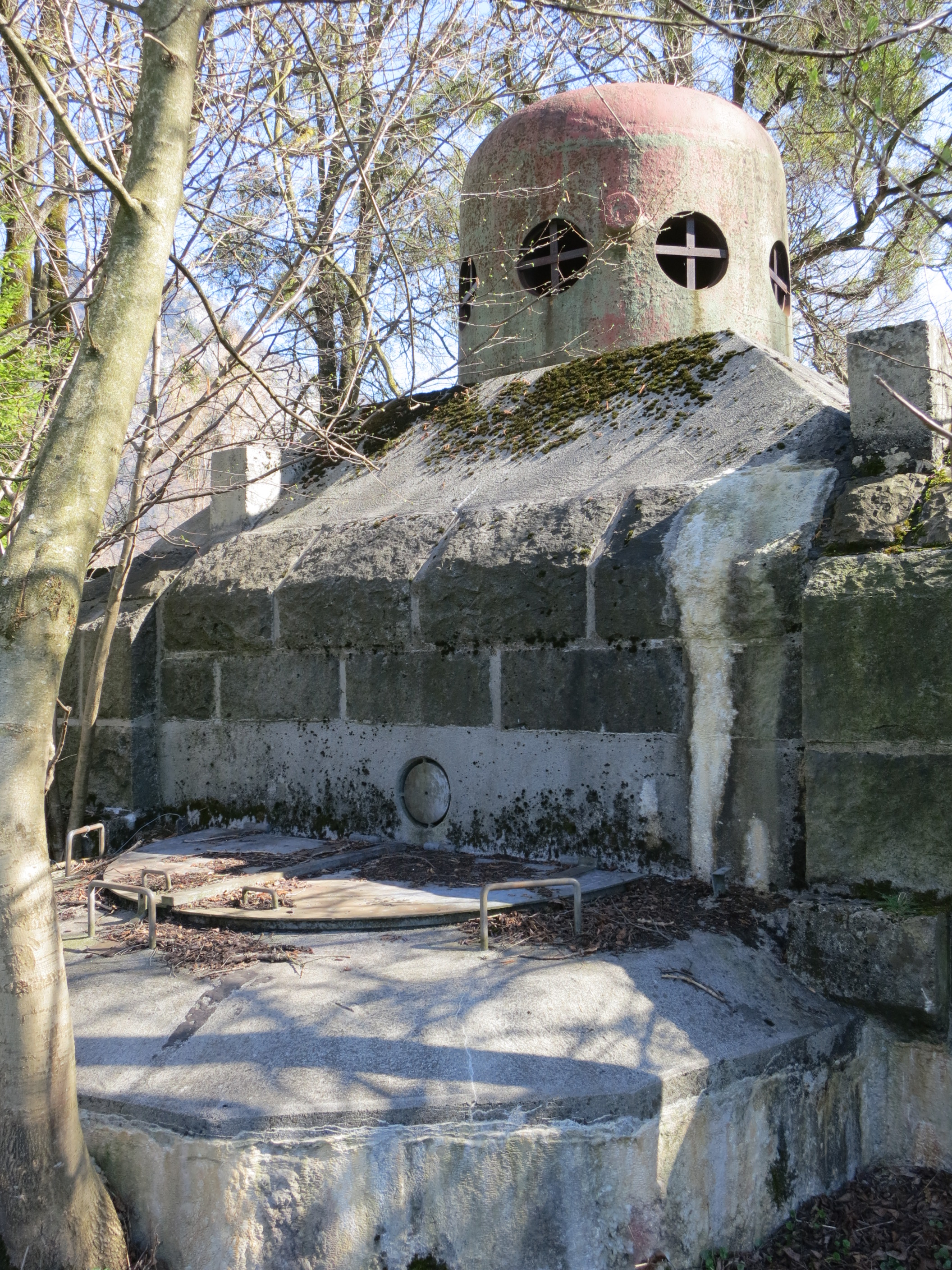 Infanteriebunker, Mollis GL, Schweiz